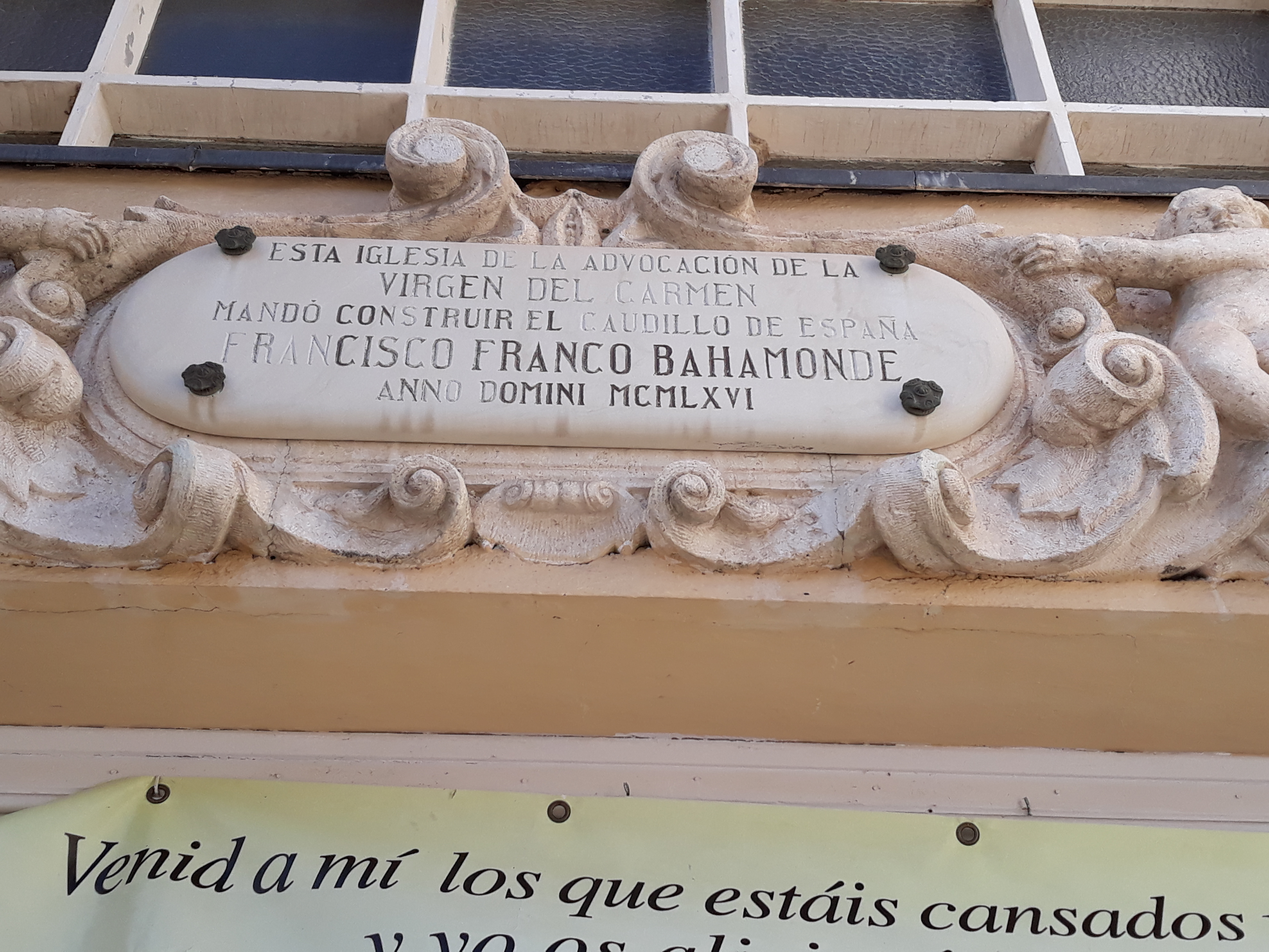 Inschrift mit Verweis auf den spanischen Staatschef ("caudillo") Francisco Franco an der Iglesia Virgen del Carmen in Madrid-El Pardo.